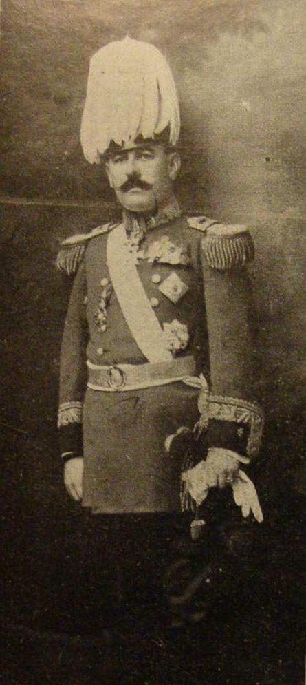 El Teniente General José Félix Uriburu, presidente de facto de la Argentina entre 1930 y 1932, luego de tomar el poder luciendo las condecoraciones de países extranjeros otorgadas por su extensa trayectoria militar.